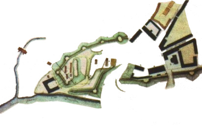 План Могилевского замка. XIX в.